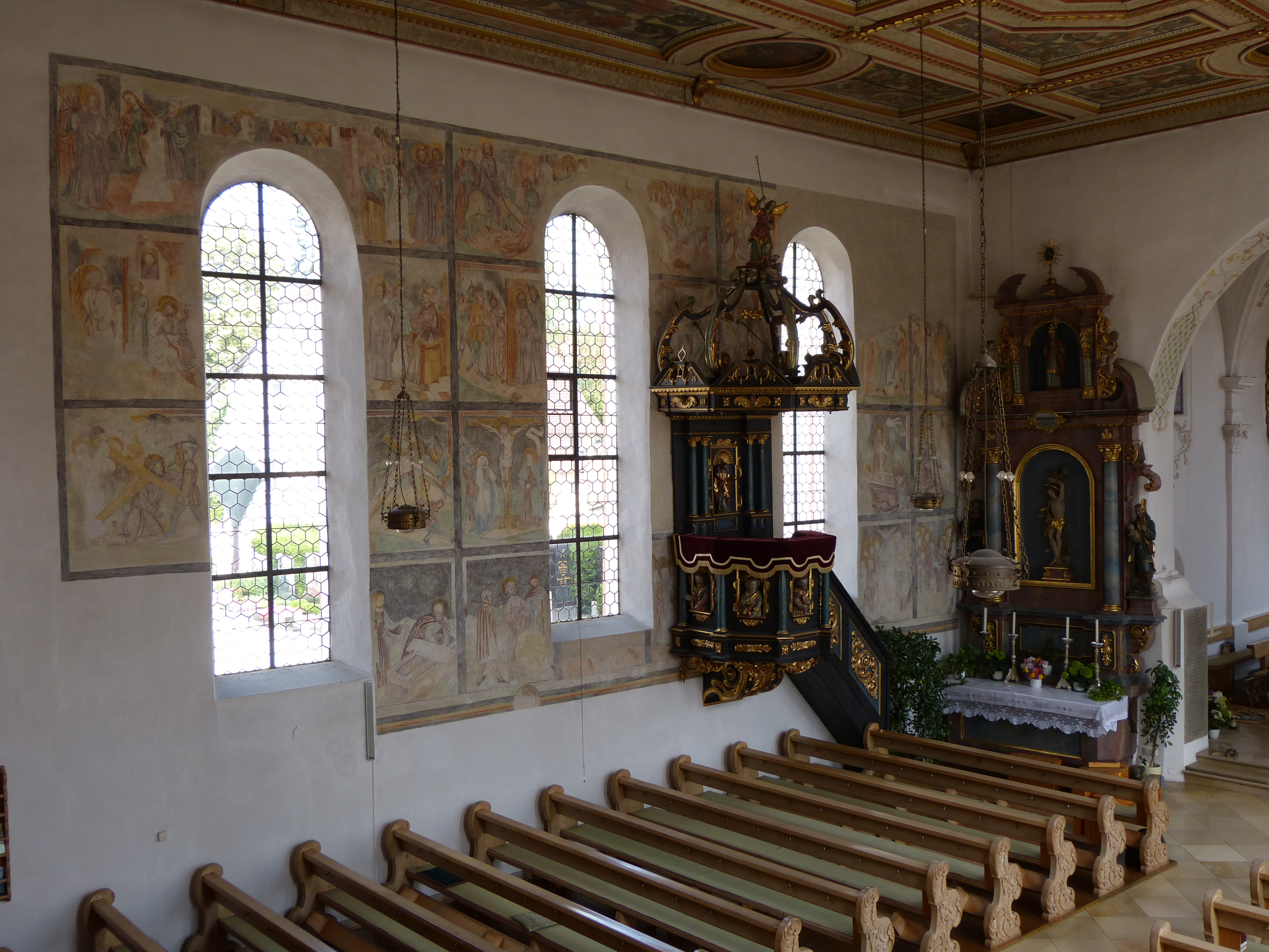 Mariä Himmelfahrt, Oberkammlach, Landkreis Unterallgäu, Bayern